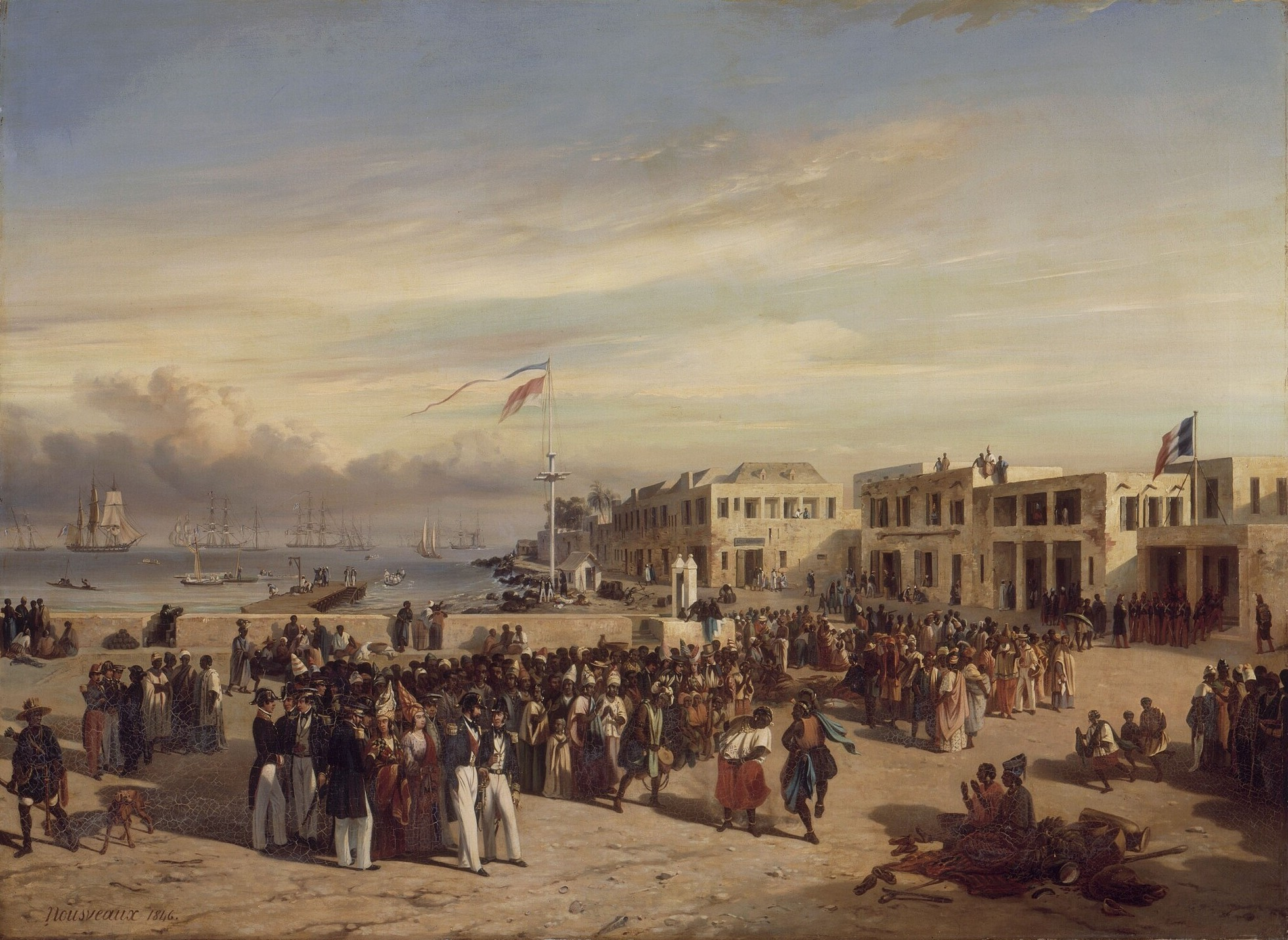 Titre exact : Le prince de Joinville assistant à une danse dans l'île de Gorée, décembre 1842. Dimensions : 131 x 178 cm. Cadre : 148,2 x 195,5 x 7 cm. Matière et technique : huile sur toile.